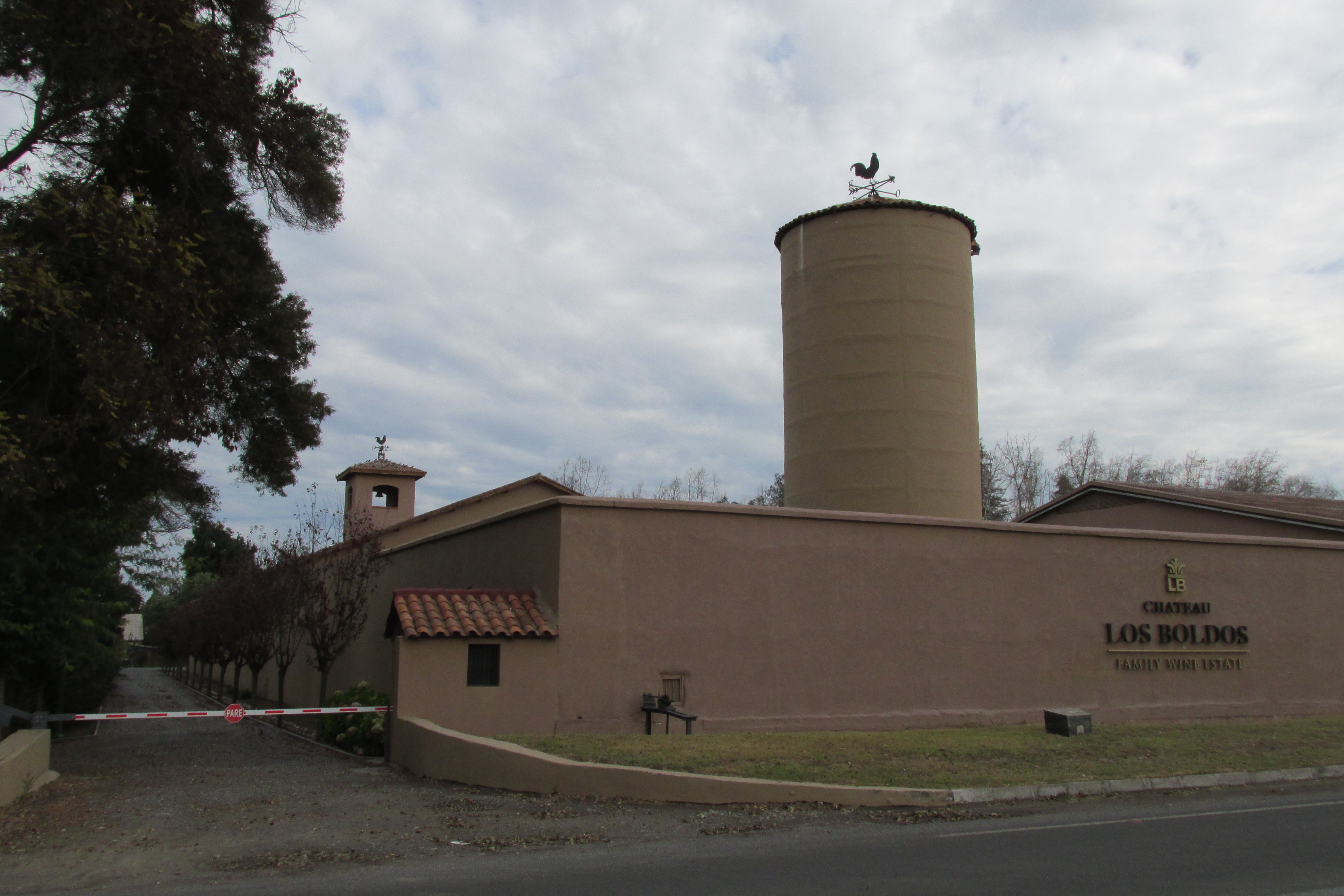 Frontis Viña Chateua Los Boldos comuna Requinoa